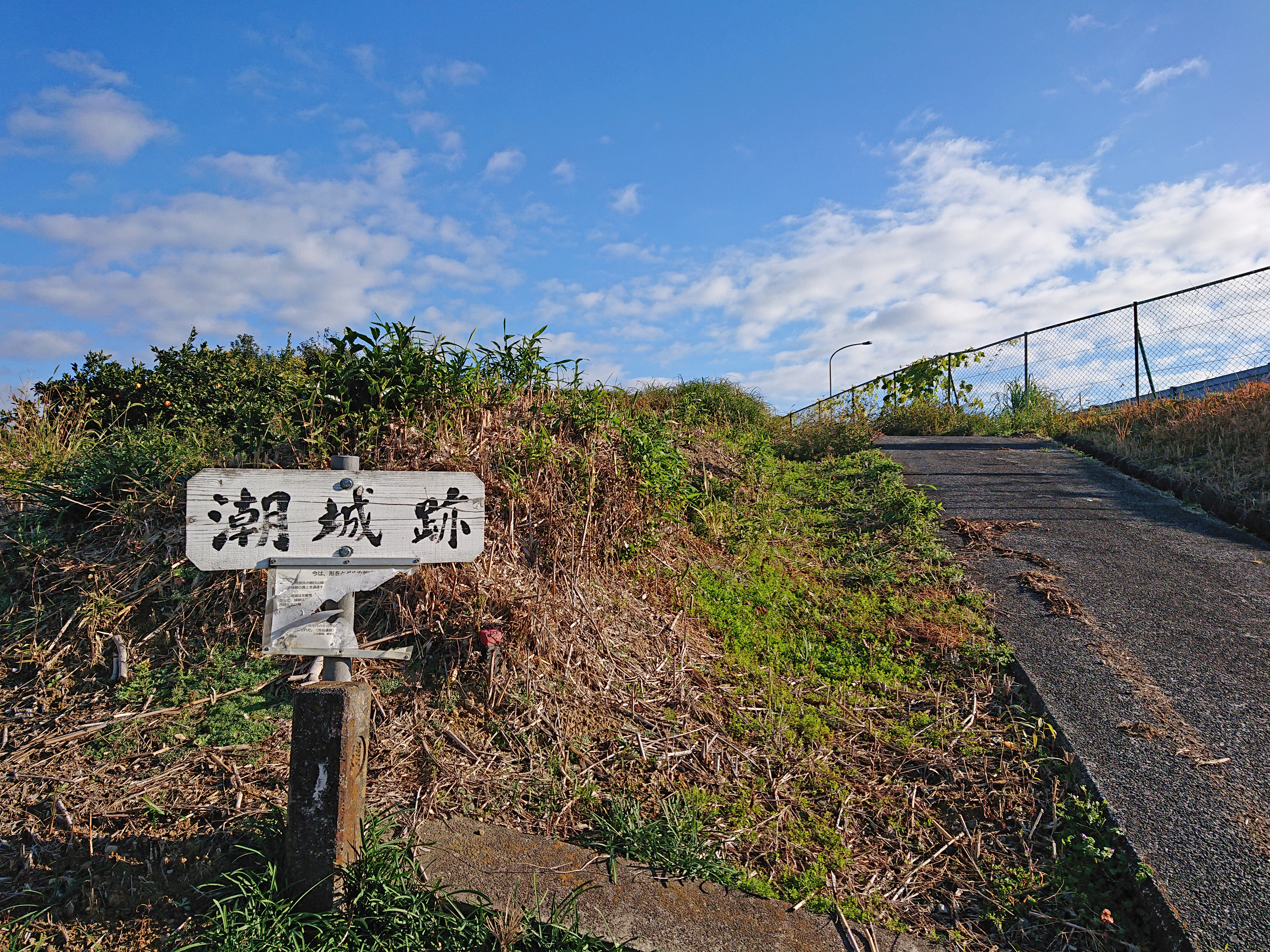 潮城の曲輪と看板。写真右側は国道1号線藤枝バイパス。